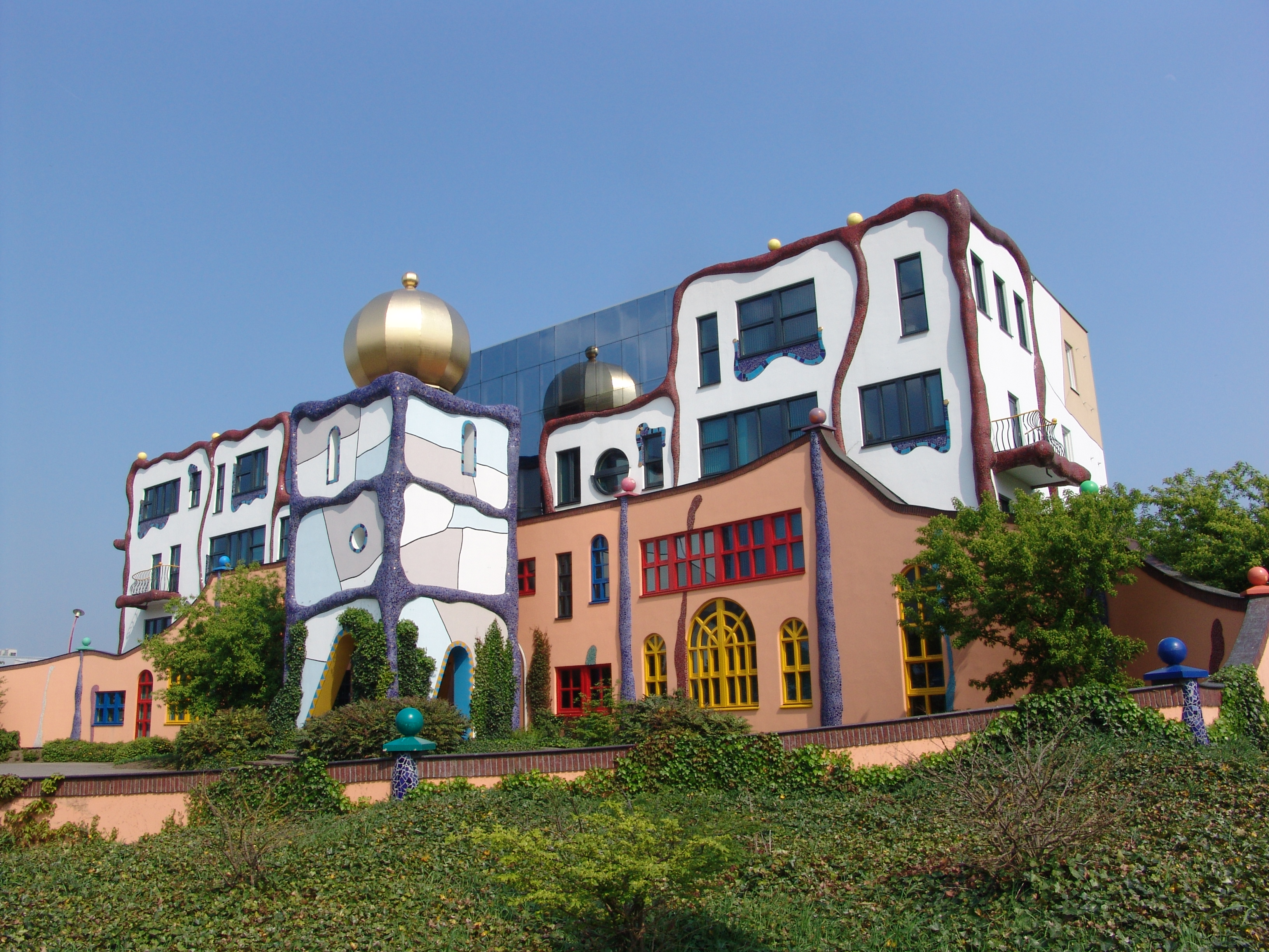 Aan de Stegge-Gebouw te Goor.